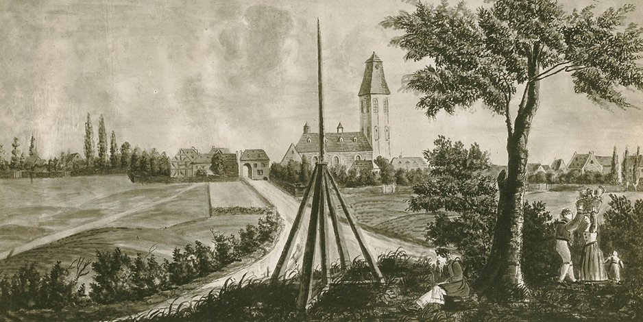 Ansicht der Stadt Kerpen im 19. Jahrhundert - Fotografie eines Aquarells von Julius Stephan Wegeler; Standort nördlich an der alten Köln-Dürener Landstraße, heutige Alte Landstraße; im Vordergrund vermutlich Mitglieder seiner Familie, darunter seine Mutter Eleonora Brigitte Wegeler, geborene von Breuning.